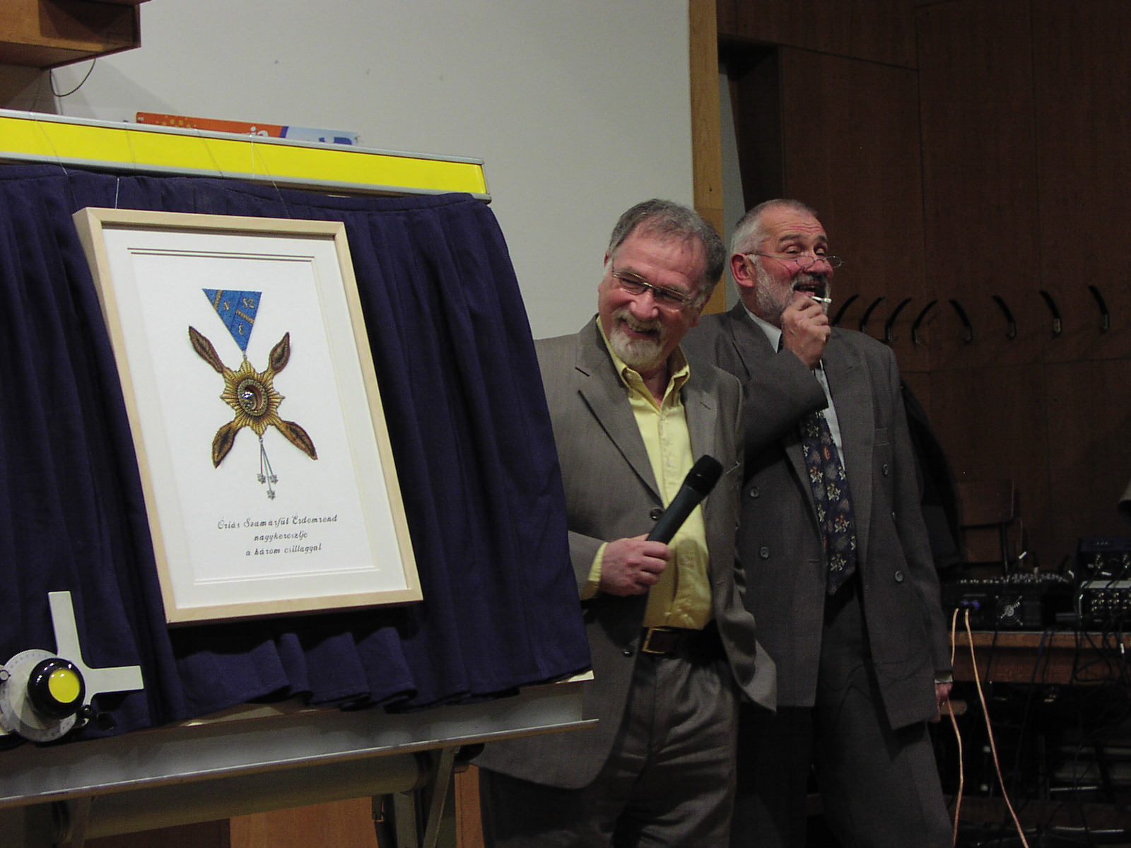 Vágó István és Orosz László az Óriás Szamárfül Érdemrend nagykeresztje mellett (a három csillaggal)